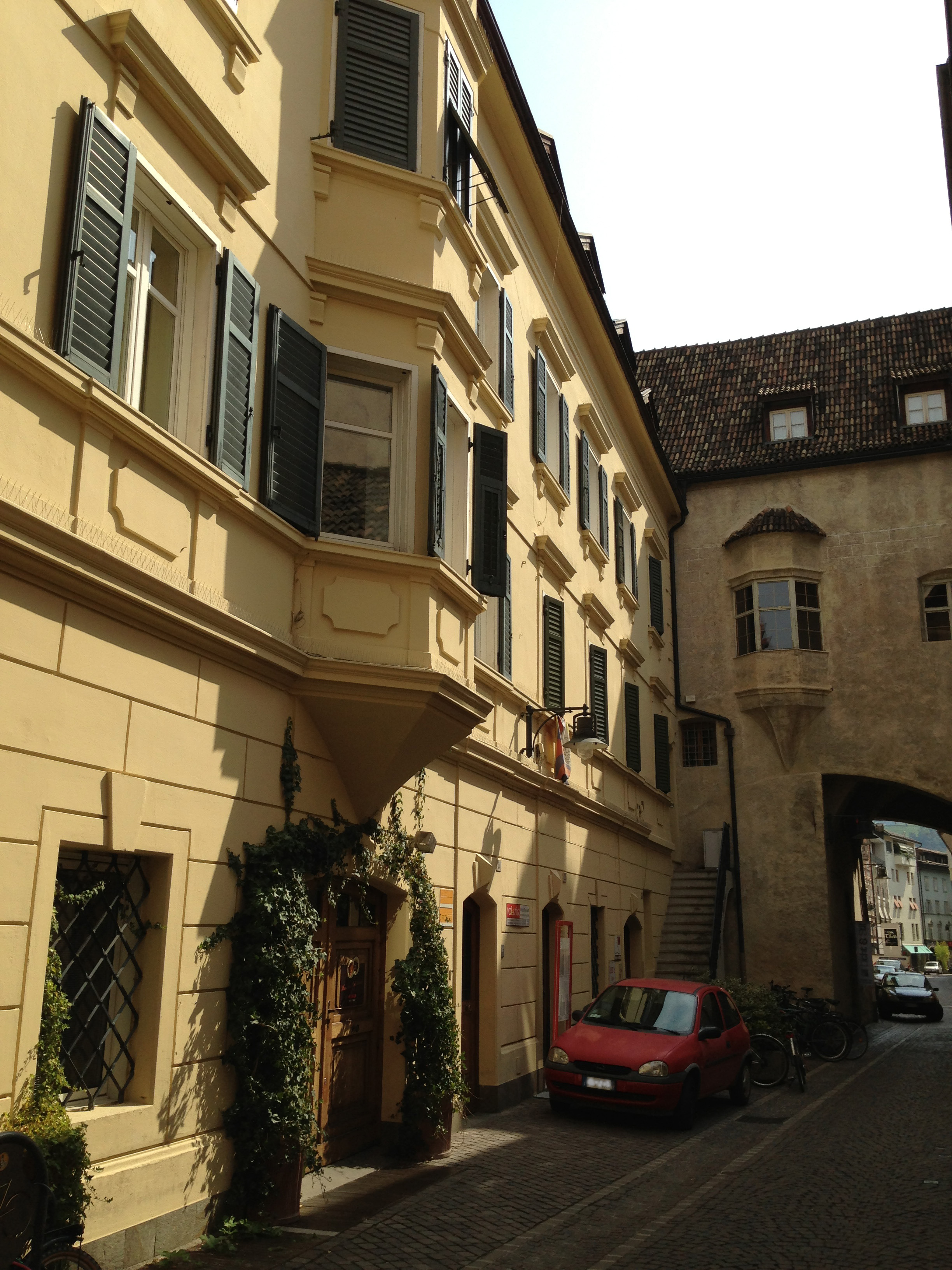 Dr.-Streiter-Gasse 22-24 in Bozen